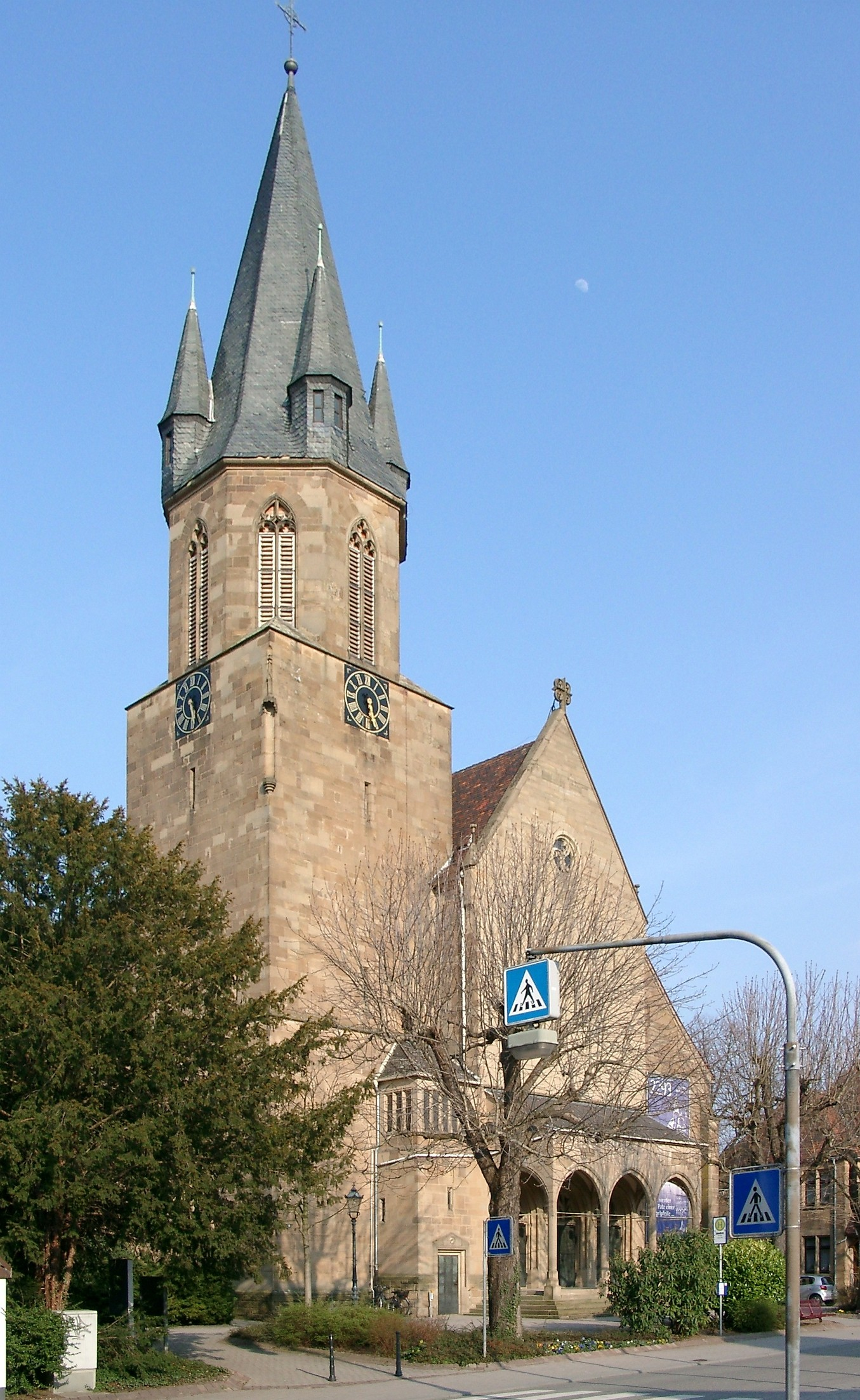 Rauenberg, Kirche der katholischen Pfarrgemeinde St. Peter und Paul